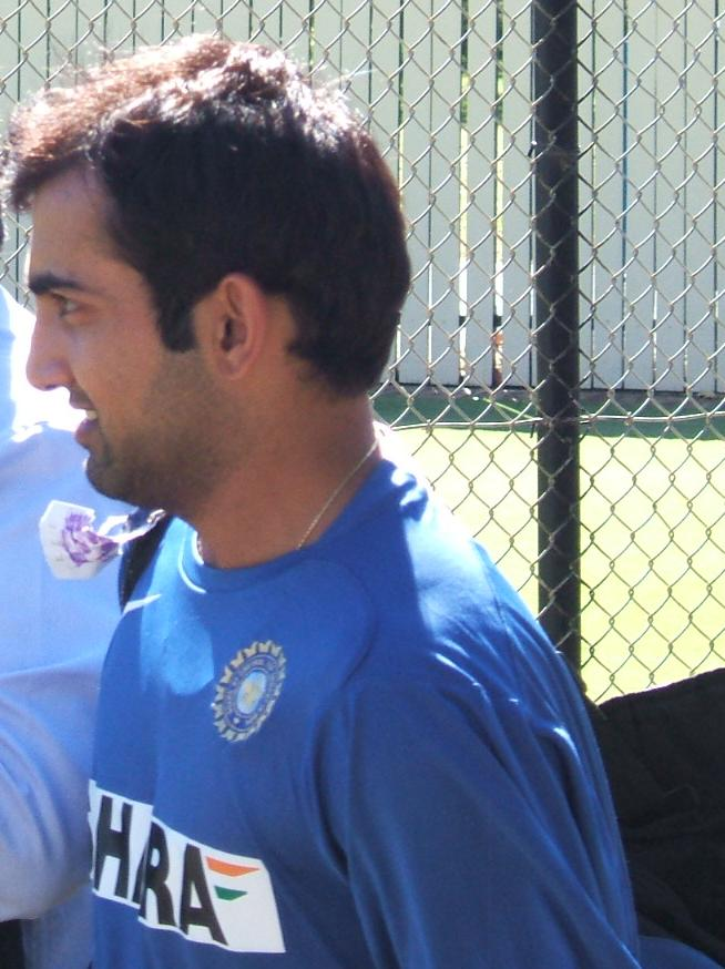 Gautam Gambhir at Adelaide Oval